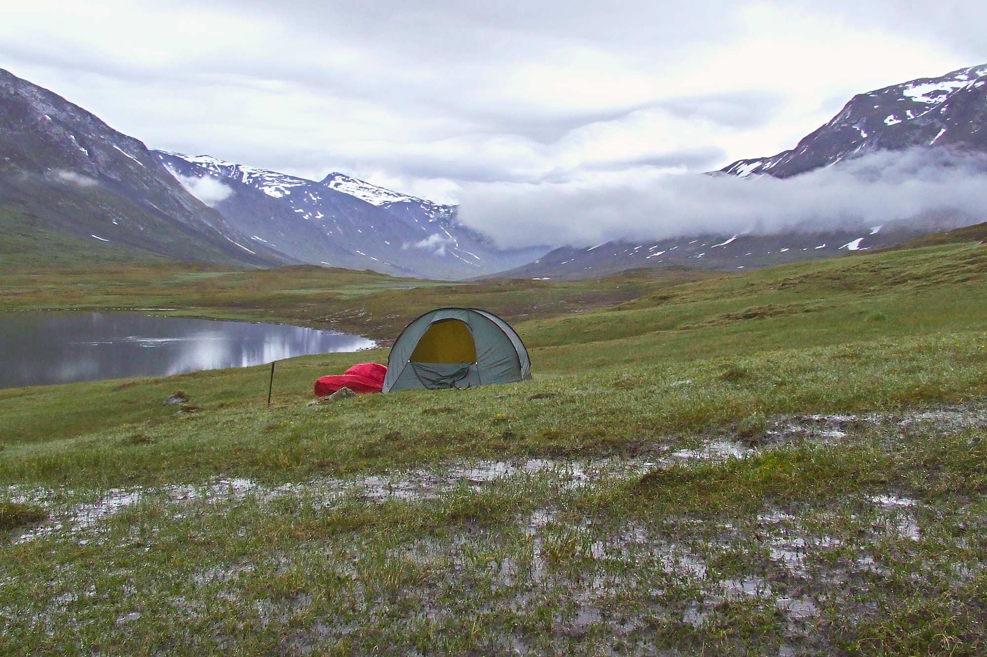 Zelt am Ruohtesjávrásj im westlichen Sarek-Nationalpark